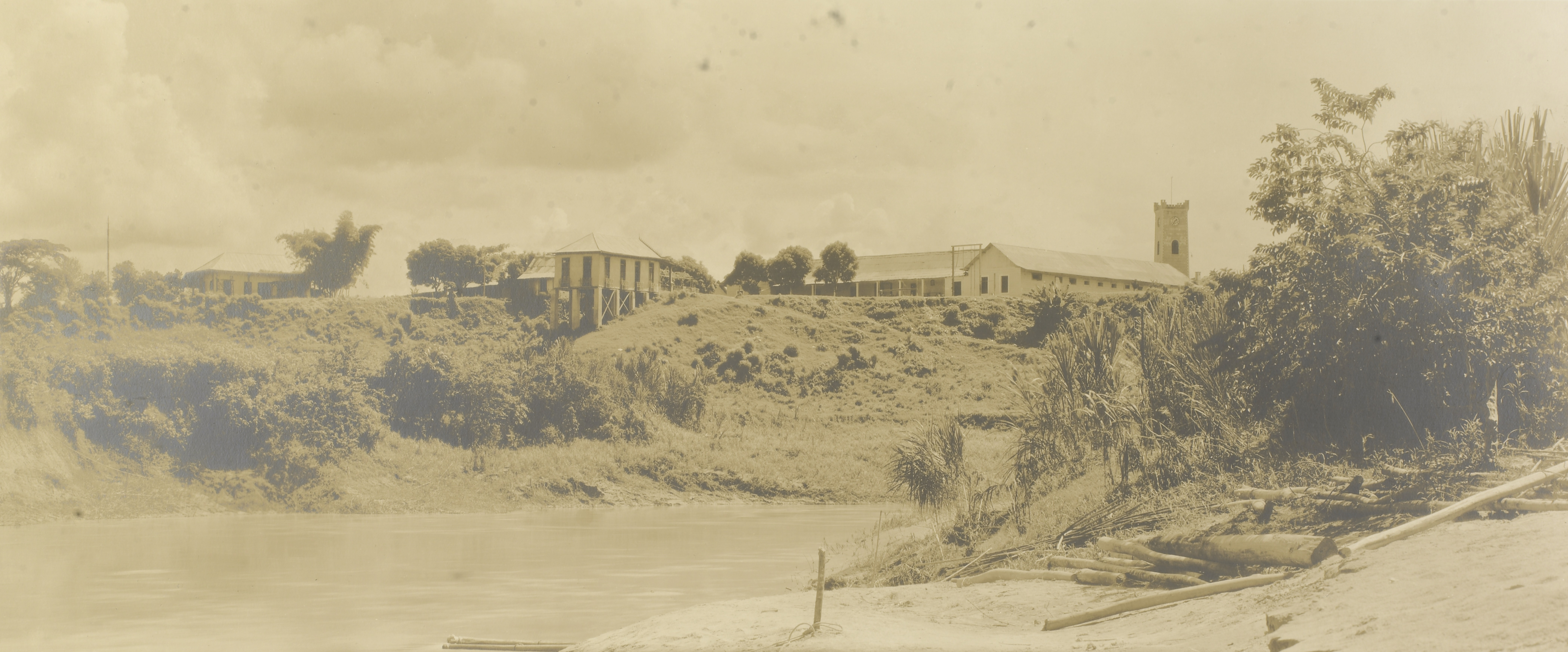 Imagem do Fundo Ministério da Guerra, do Arquivo Nacional